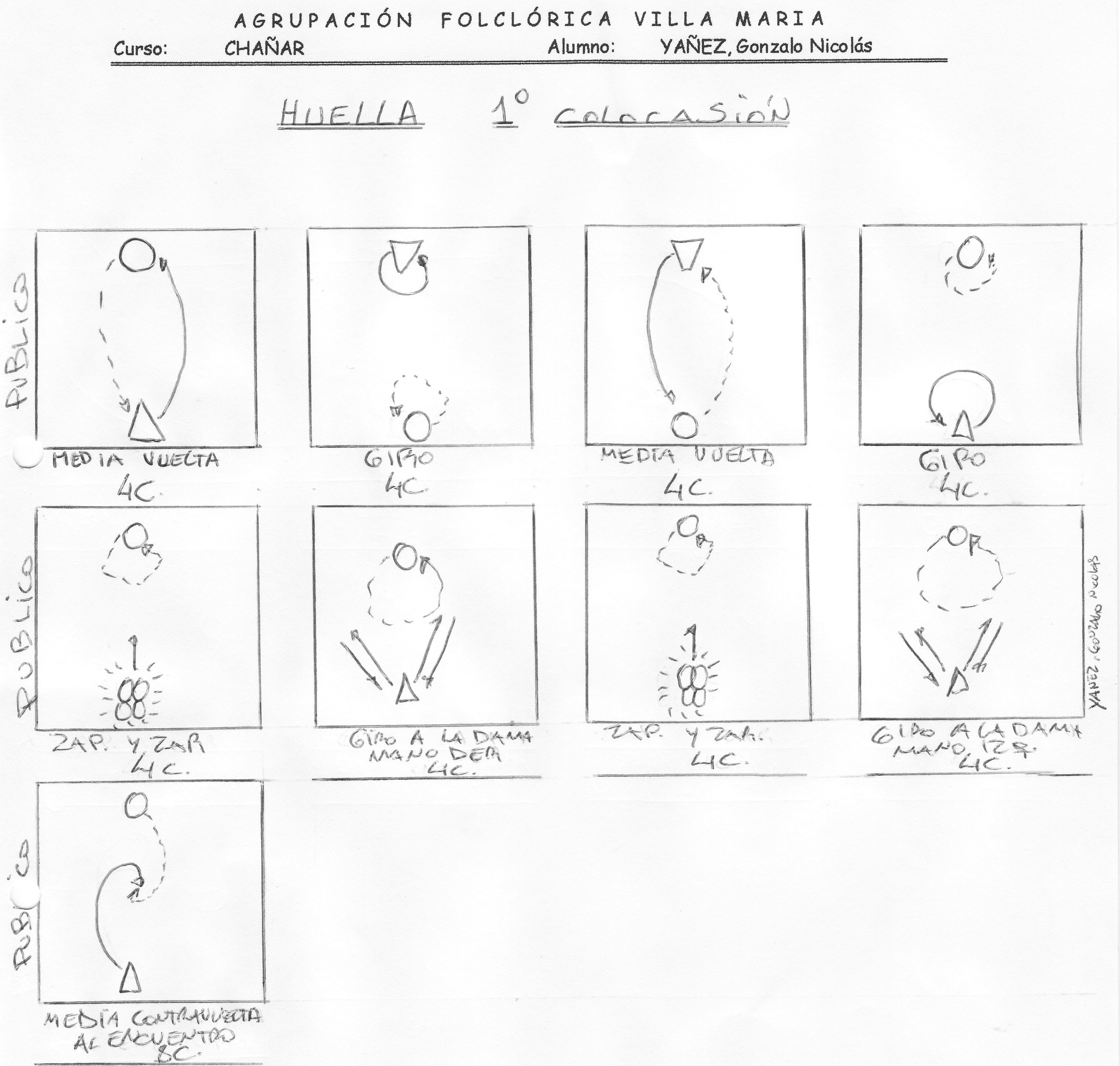 cuadros coreograficos de 1 colocacion